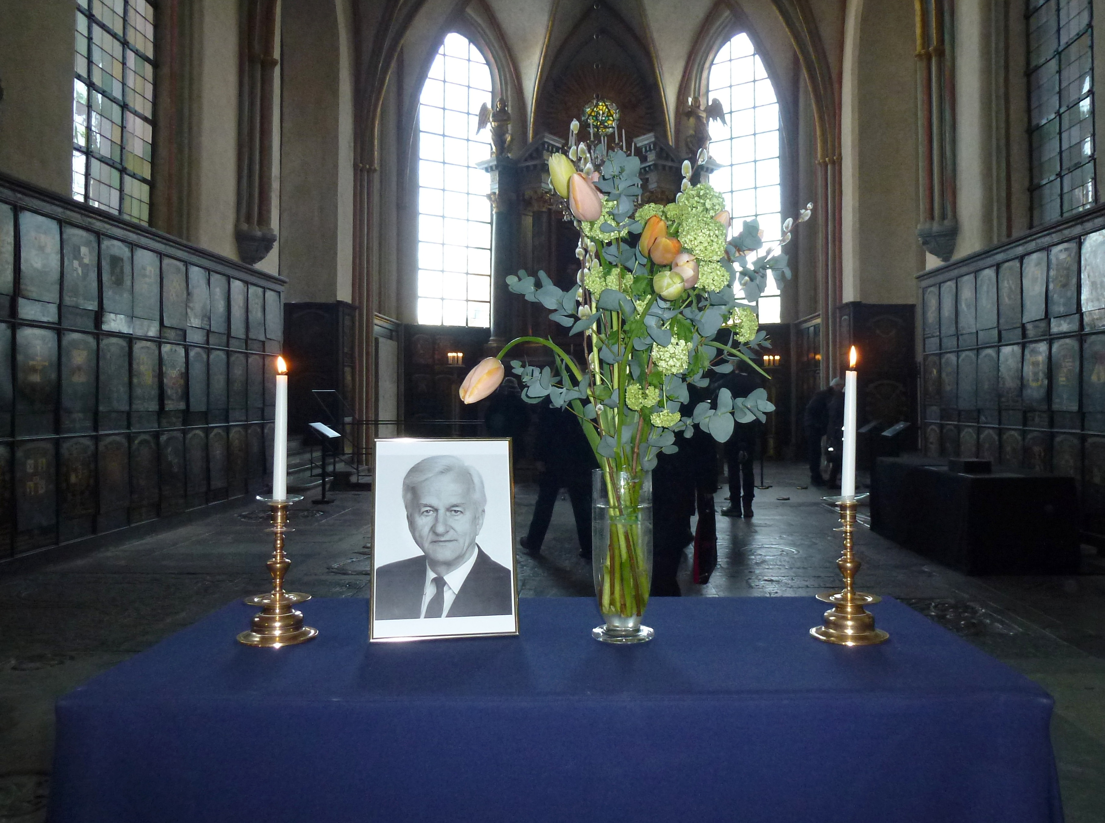 Serafimerringning i Riddarholmskyrkan 11 februari 2015 för Tysklands förutvarande förbundspresident Richard von Weizsäcker